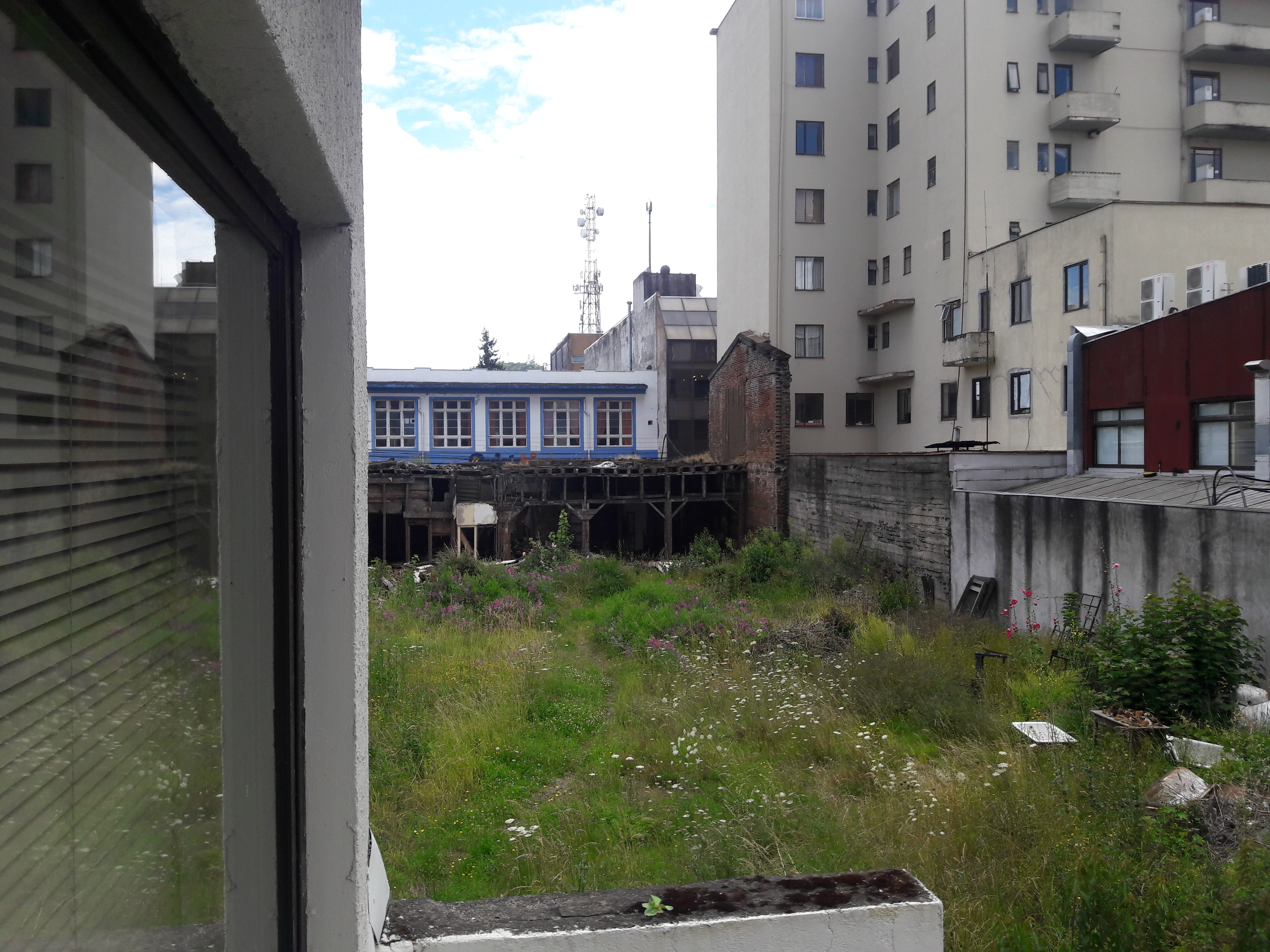 Parte trasera del Hotel Continental, monumento nacional de Chile, ubicado en el Sector Centro de la ciudad de Temuco. Se puede apreciar el deterioro de la estructura.